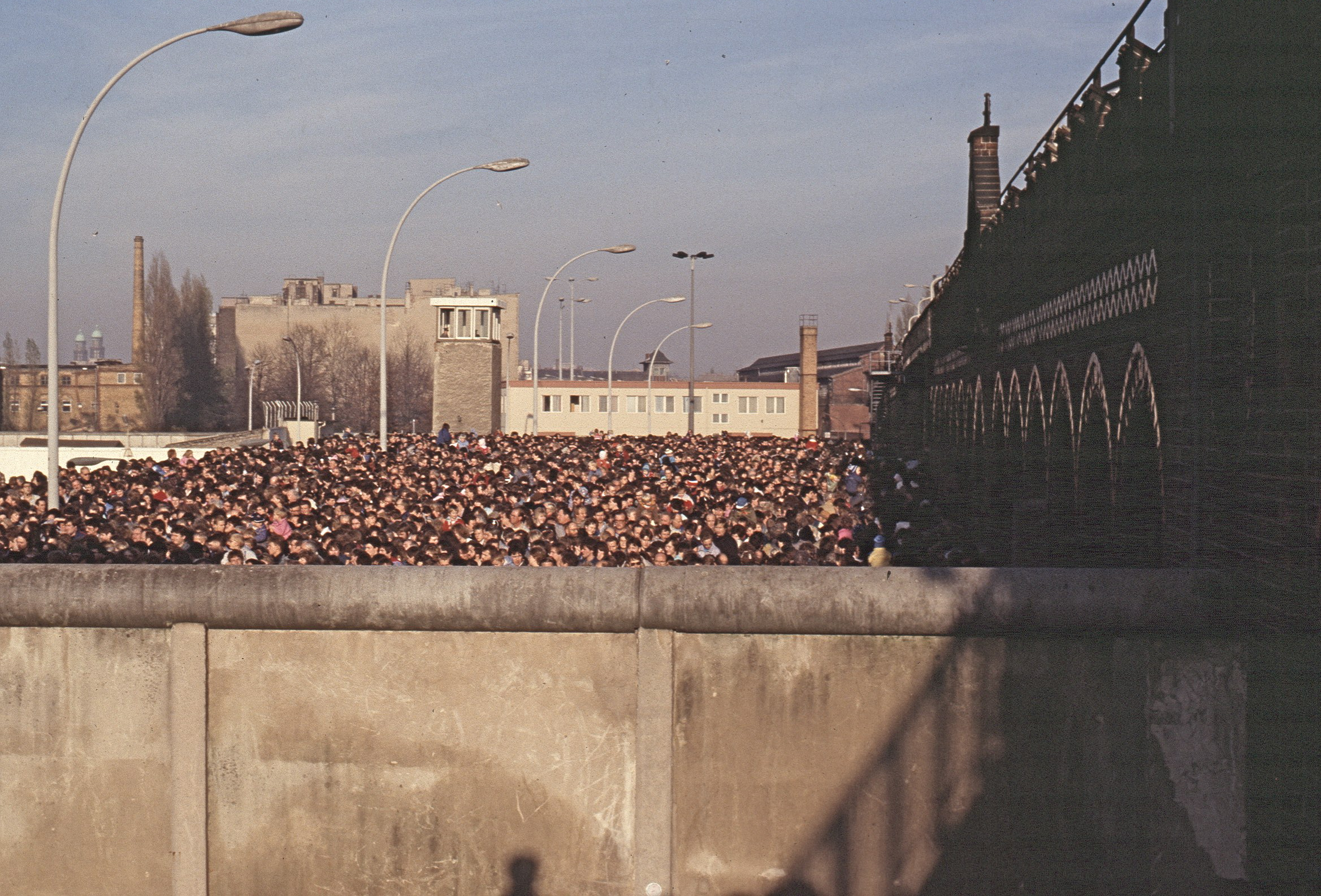 Grenzübergang Oberbaumbrücke nach der Maueröffnung